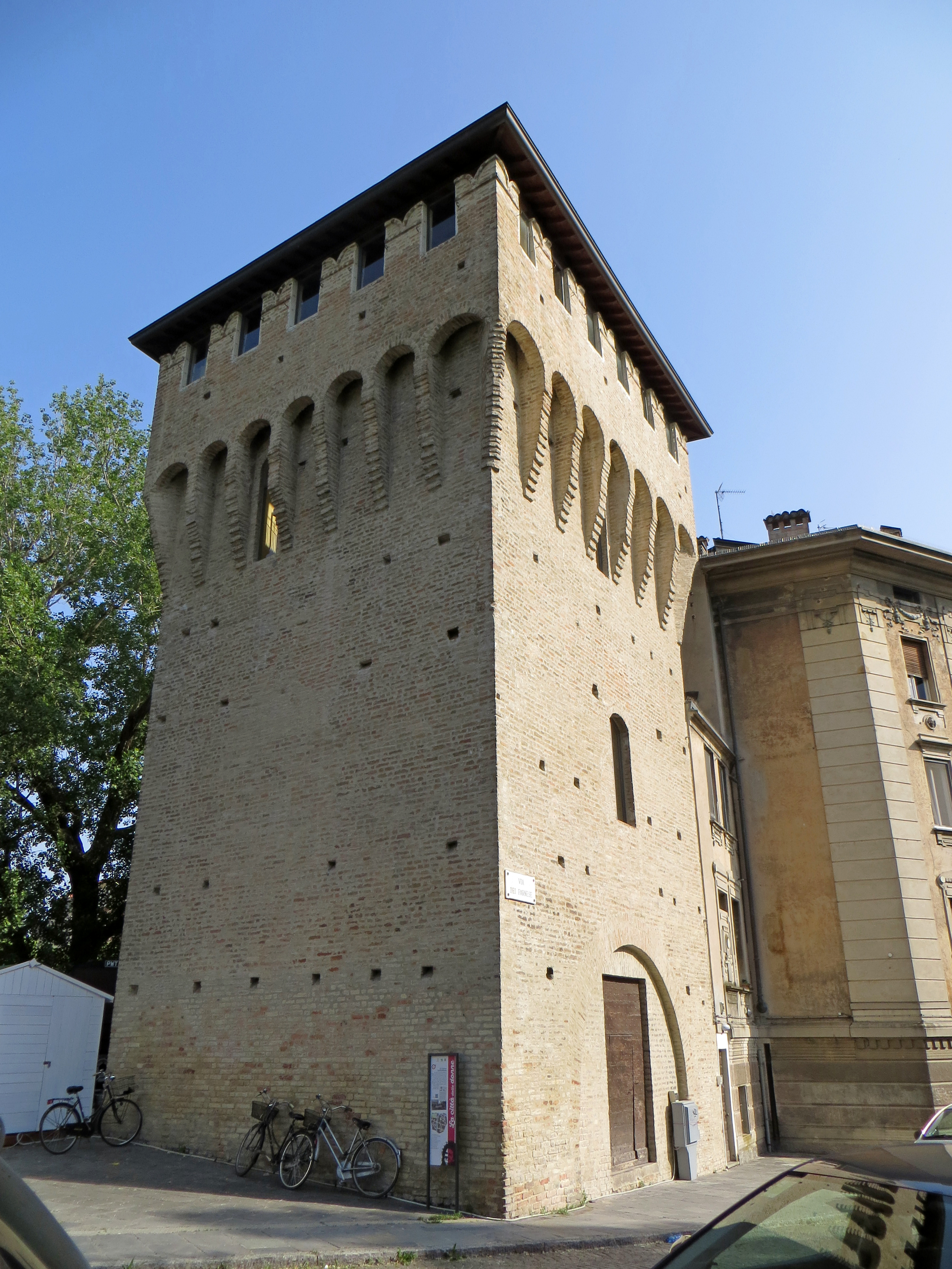 Torrione Visconteo (Parma) - lati nord e ovest